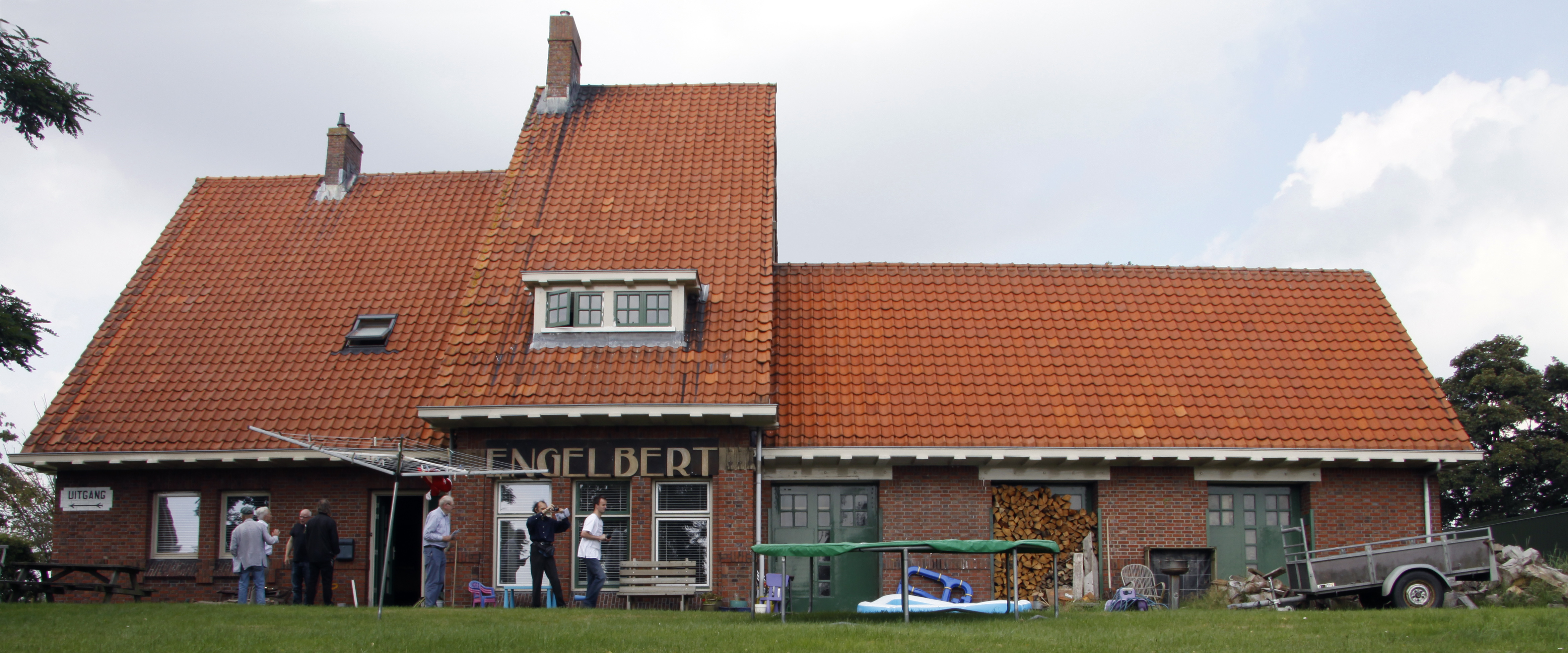 Woldjerspoorweg 40-42